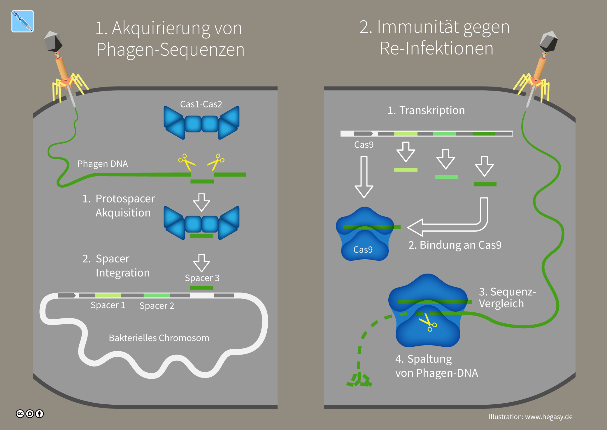 Der CRISPR Gen-Locus verleiht Bakterien adaptive Immunität gegen wiederholte Phageninfektionen. Links: Aus der Phagen DNA wird eine Sequenz als Protospacer geschnitten (1). Mittels Cas1-Cas2 Komplex gelangt die Sequenz zum CRISPR- Genlocus und wird als Spacer eingebaut (2). Rechts: Bei einer erneuten Phagen-Infektion werden die Spacer transkribiert und Cas9 als Protein synthetisiert (1). Spacer werden in Cas9 gebunden (2). Cas9 vergleicht die intrazelluläre DNA mit der Spacer-Sequenz (3). Wenn diese übereinstimmen, handelt es sich um eine Phagen-Sequenz, und die DNA wird zerschnitten (4).